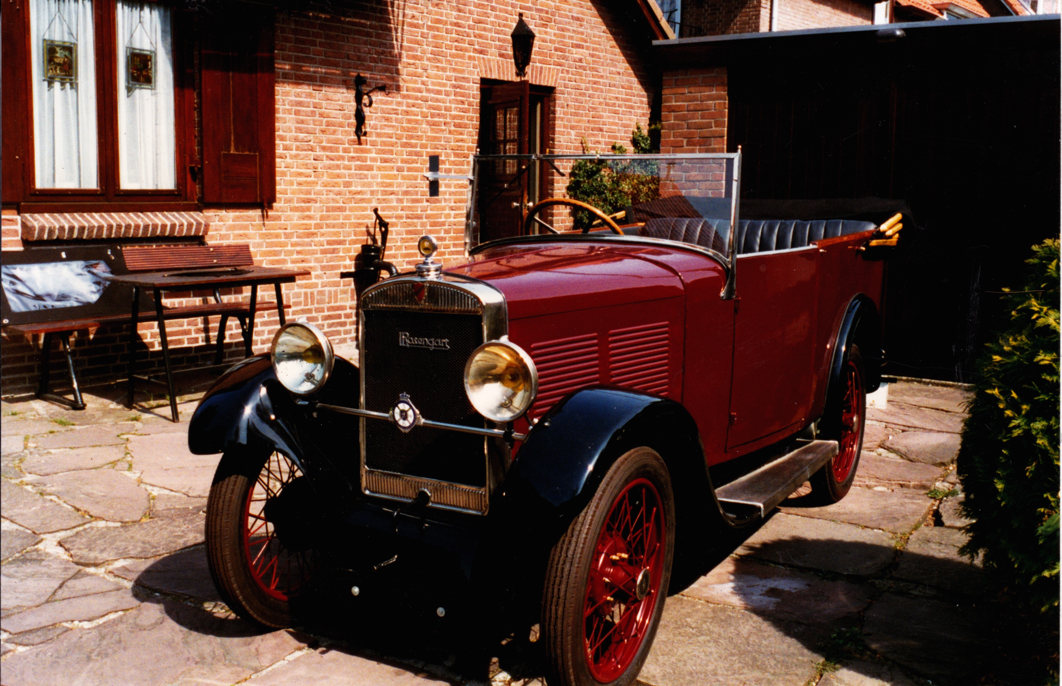 Offenes Verdeck 3 Gang 4 Zylinder